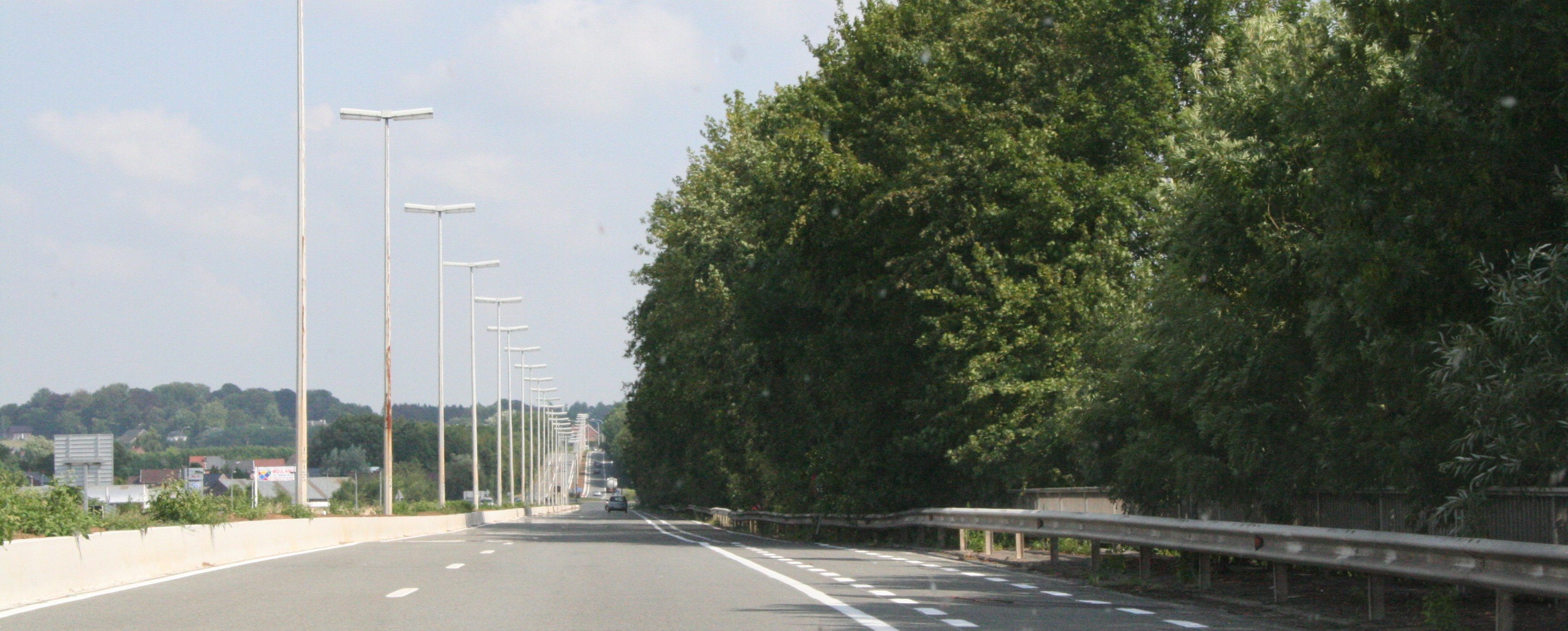 Photo du contournement d'Ath à hauteur du Pont sur la Dendre.